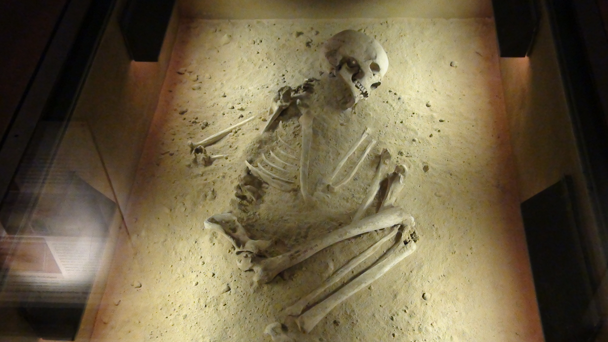 Herxi